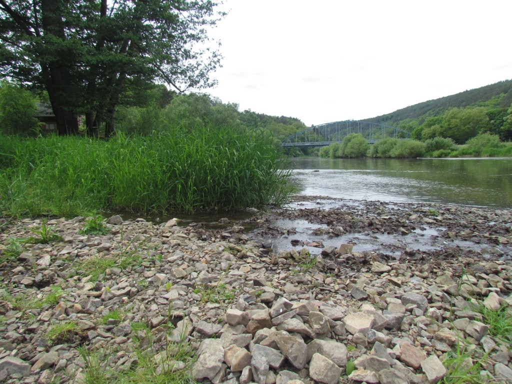 Ústí Skryjského potoka do Berounky v Luhu u Skryj